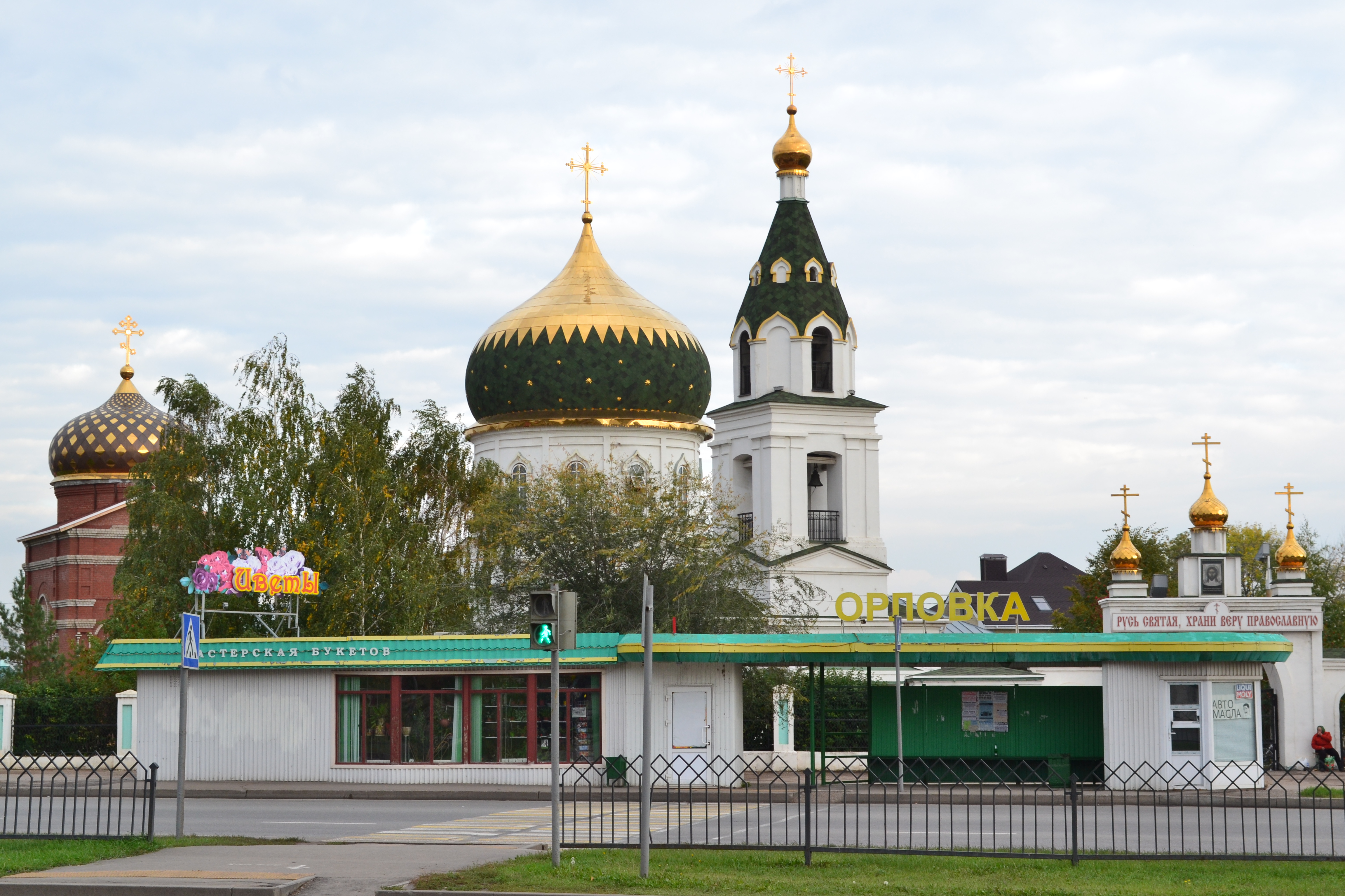 Церковь Косьмы и Дамиана (Республика Татарстан, Набережные Челны, п Орловка )